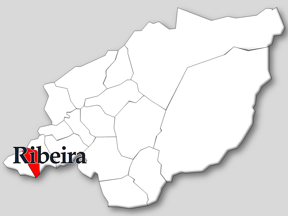 Censos 1864/2011